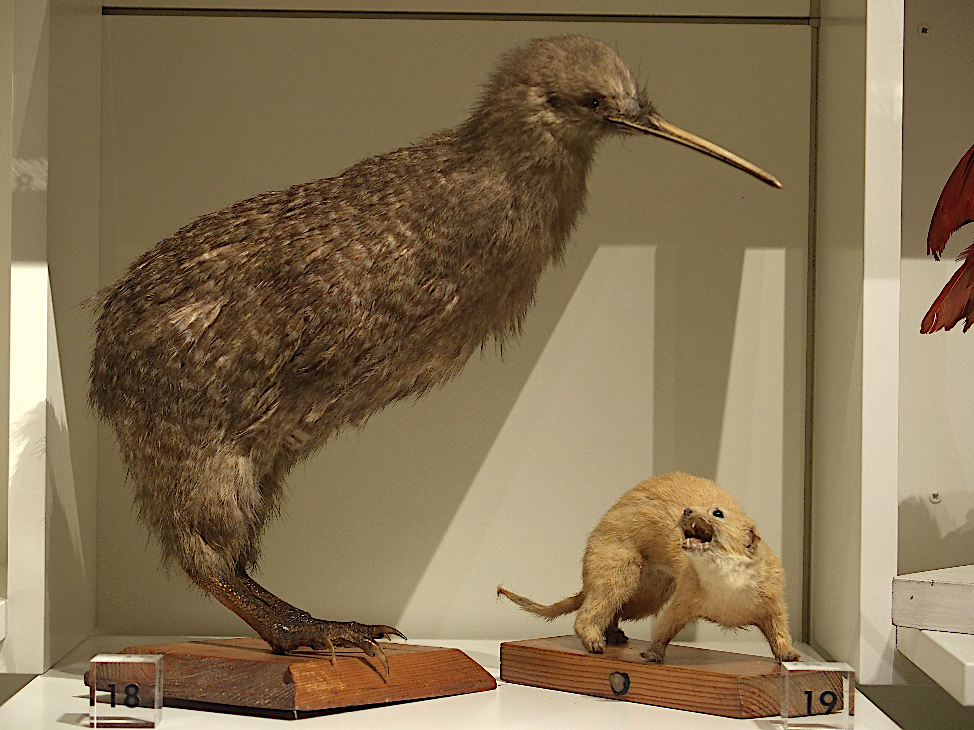 Kiwi pikart txikia eta erbinudea Bergara Laboratorium museoko erakusketa iraunkorrean